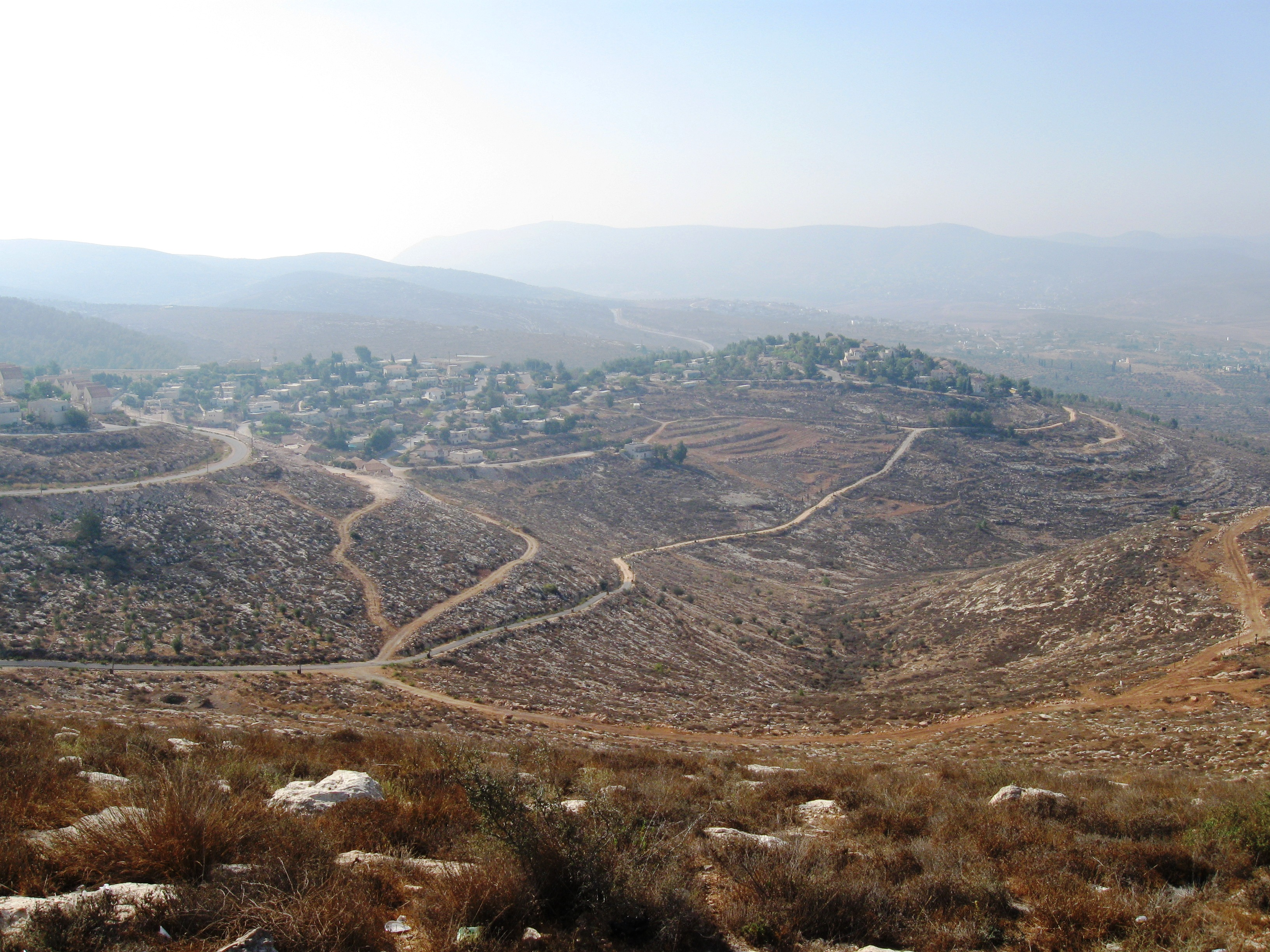 מבט על אלון מורה מהר כביר רישיון נוצר על ידי משתמש:Daniel Ventura